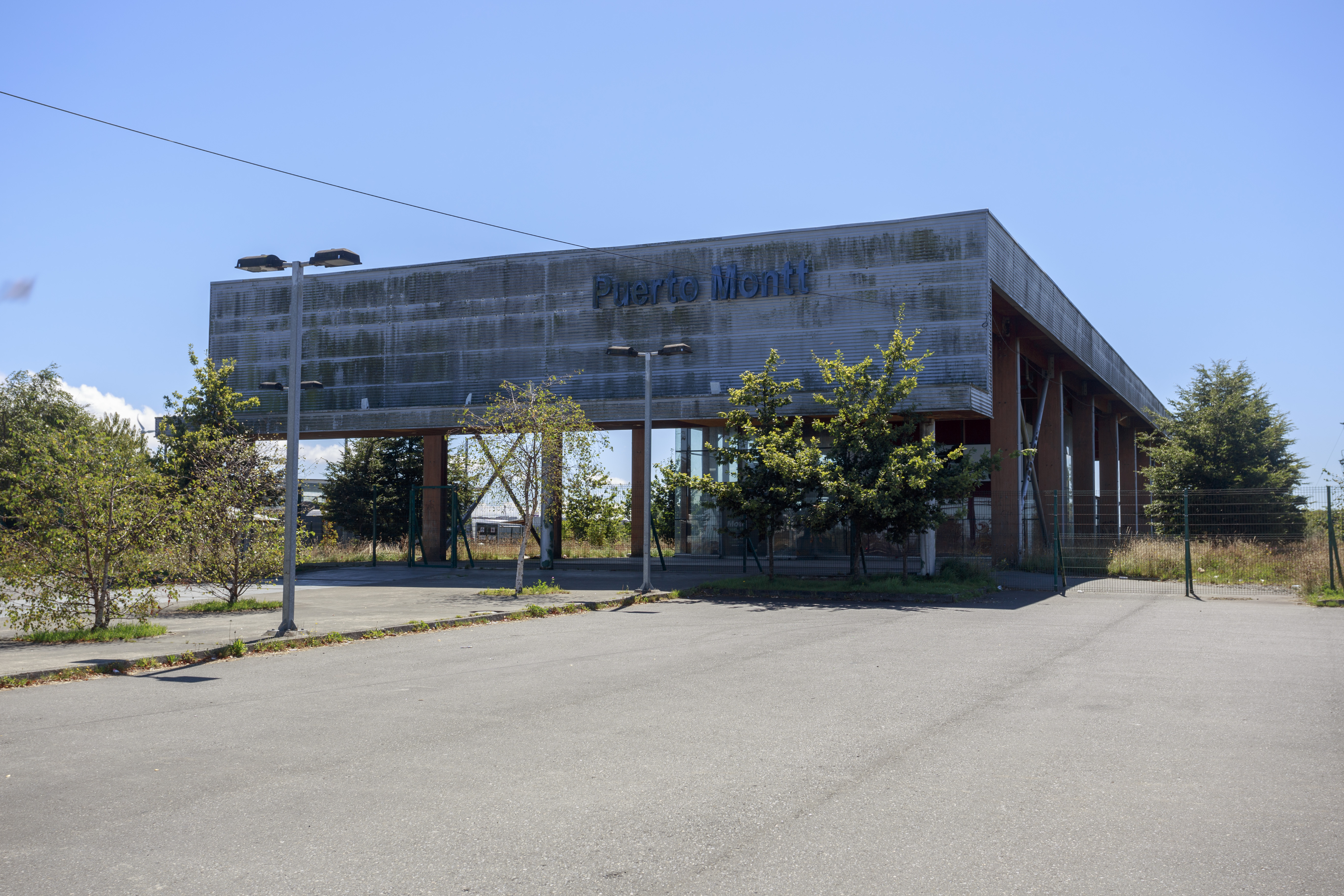 Estación de ferrocarril La Paloma, Puerto Montt, febrero 2020.